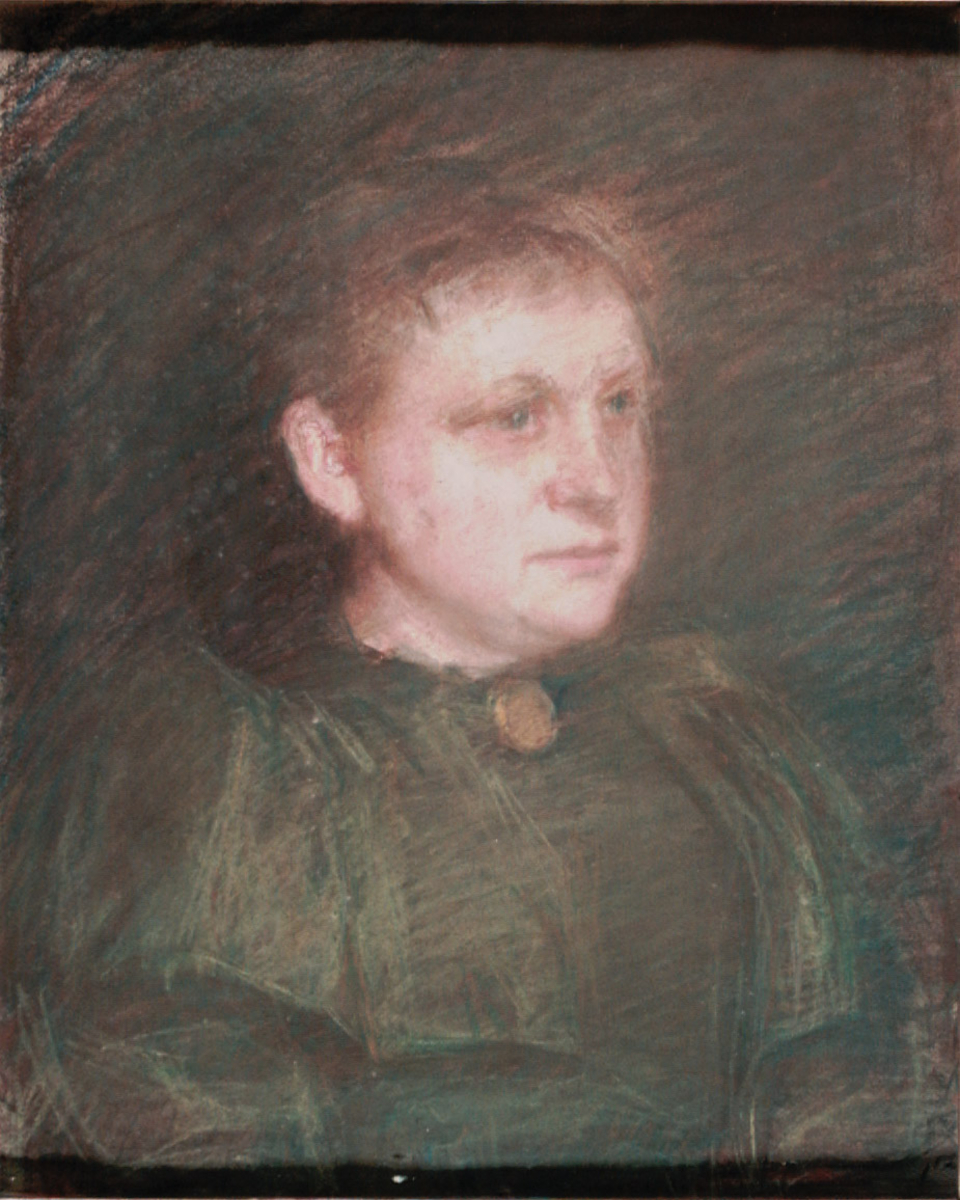 Portrett av Marie Tannæs malt av Signe Scheel (1860–1942) i 1892.